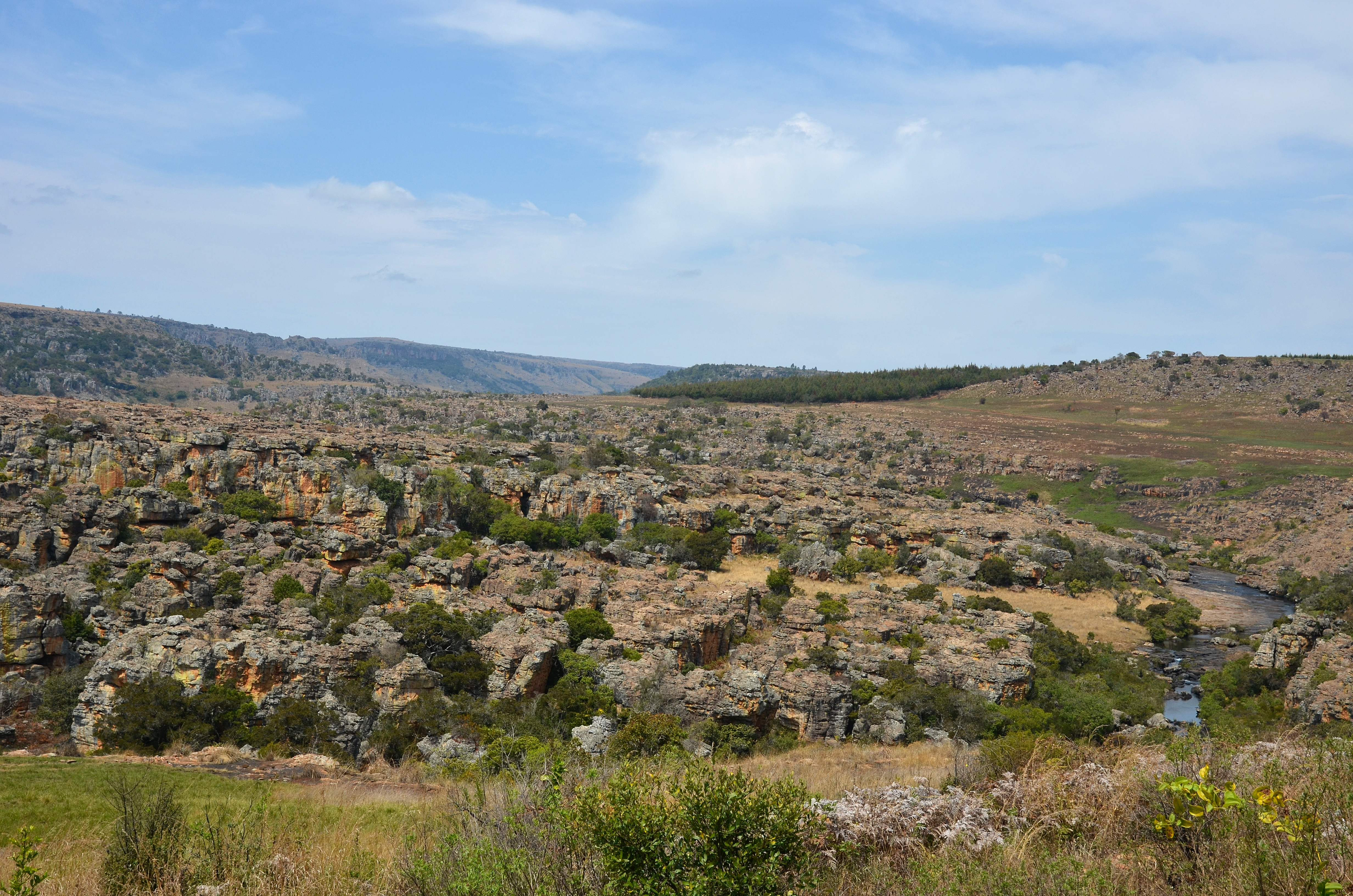 Okolí řeky Treurrivier, Jihoafrická republika